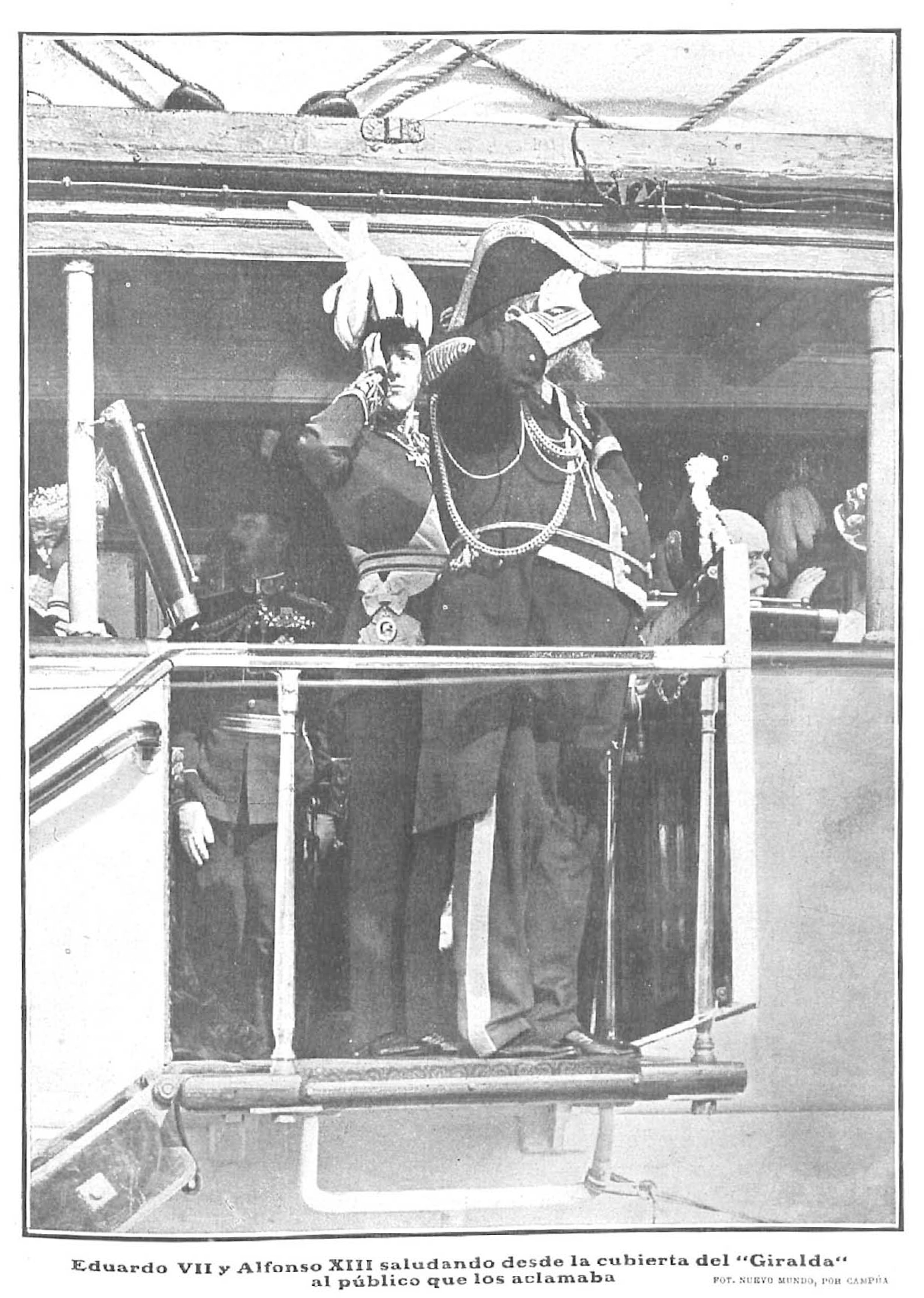 Eduardo VII y Alfonso XIII saludando desde la cubierta del «Giralda» al público que los aclamaba.